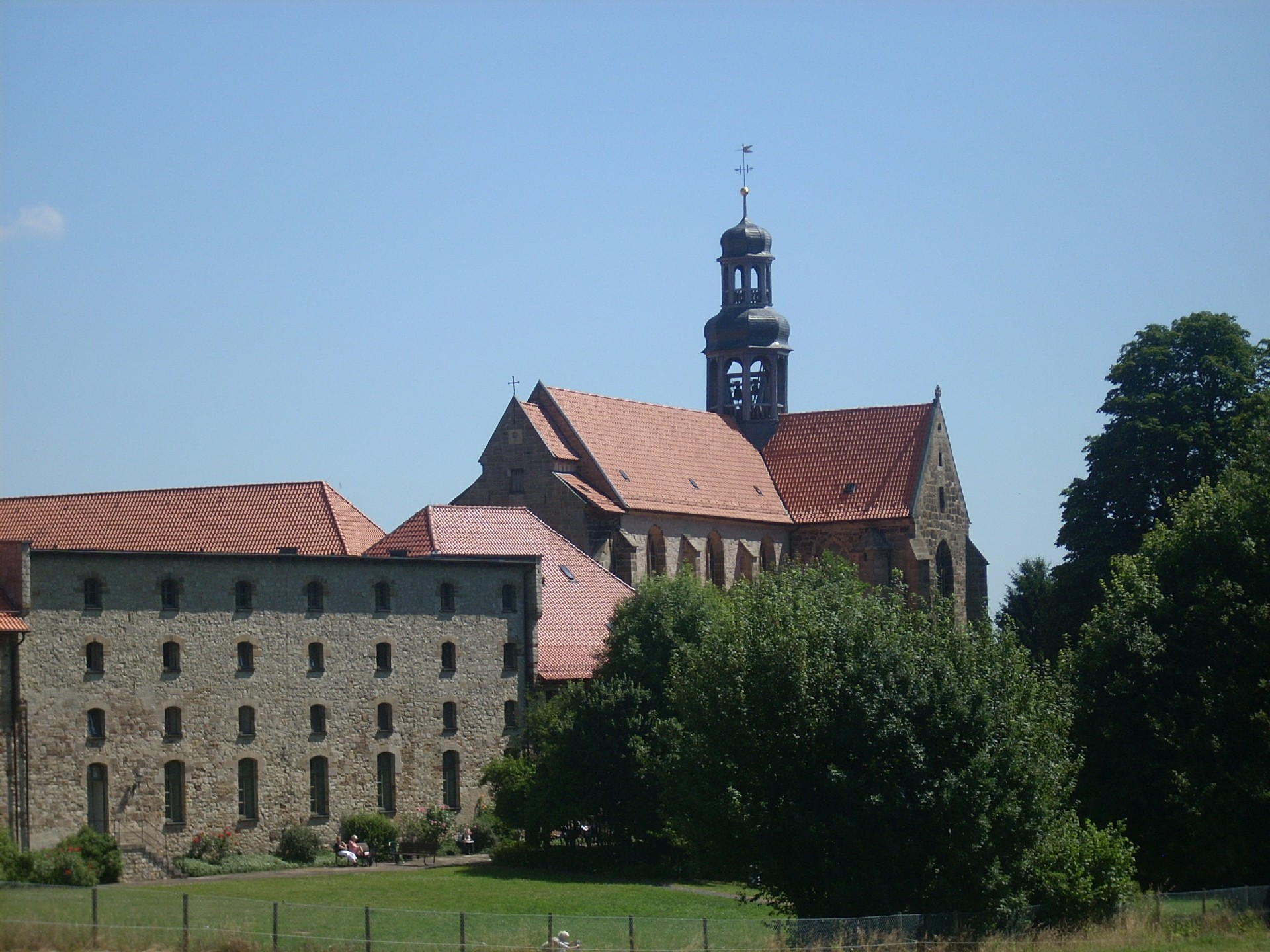 Kloster Marienrode, Klosterkirche St. Michael von Südwesten